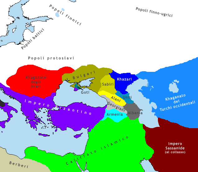 L'Europa orientale e l'Asia occidentale intorno al 650 DC.